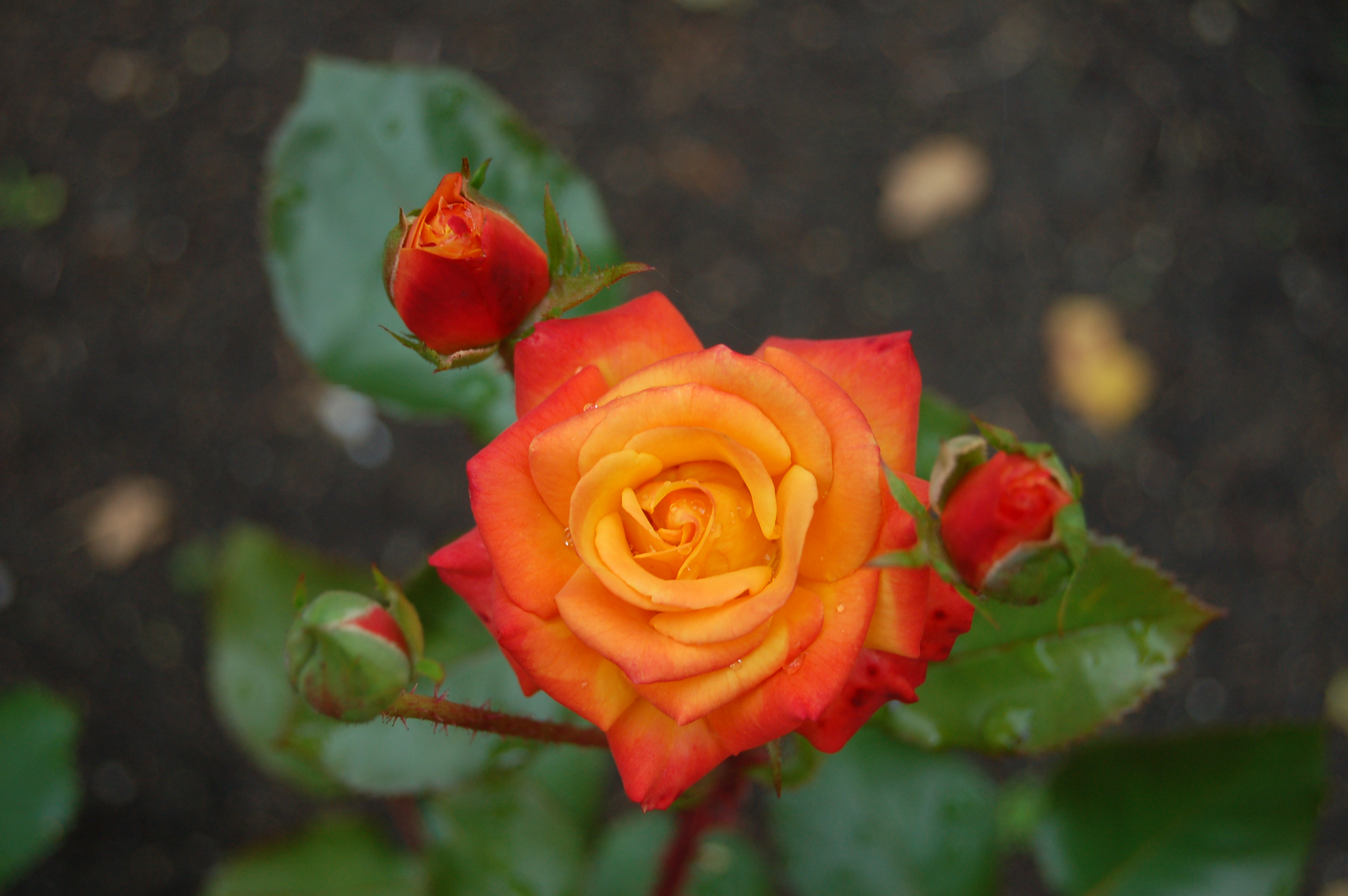 Rosa 'Mambo'